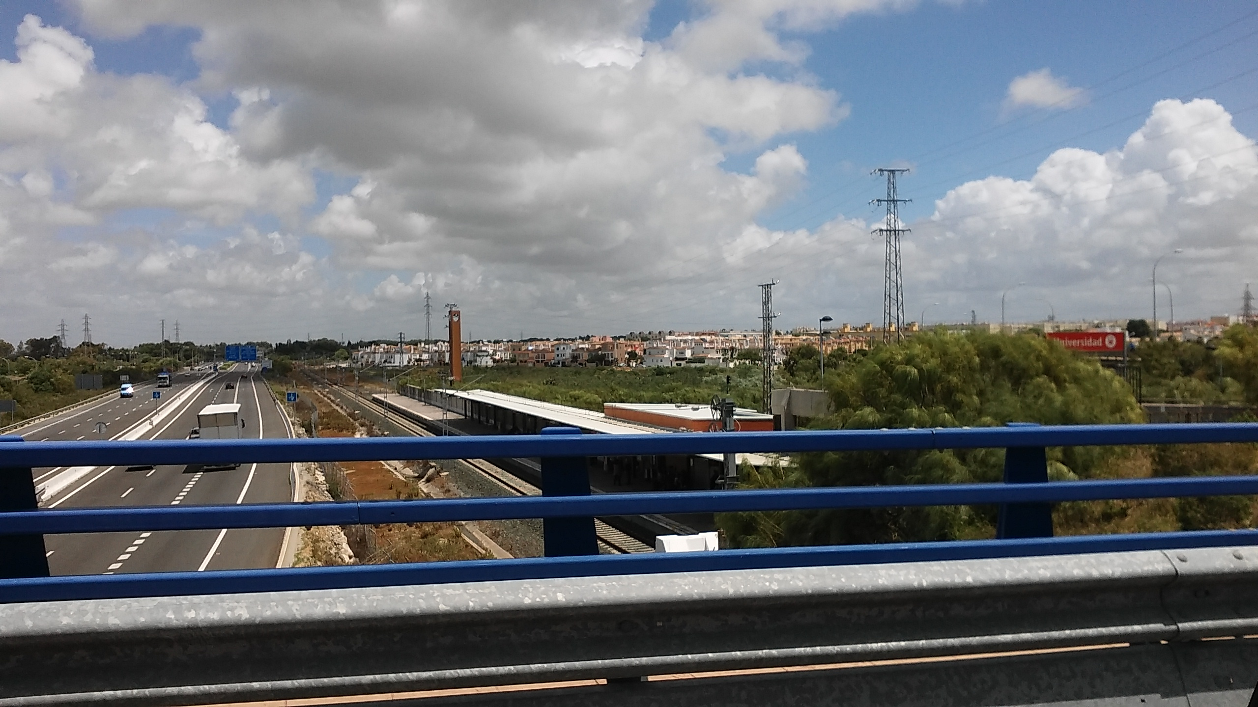 Estación Universidad de Cercanías Cádiz desde puente de acceso al Campus de Puerto Real